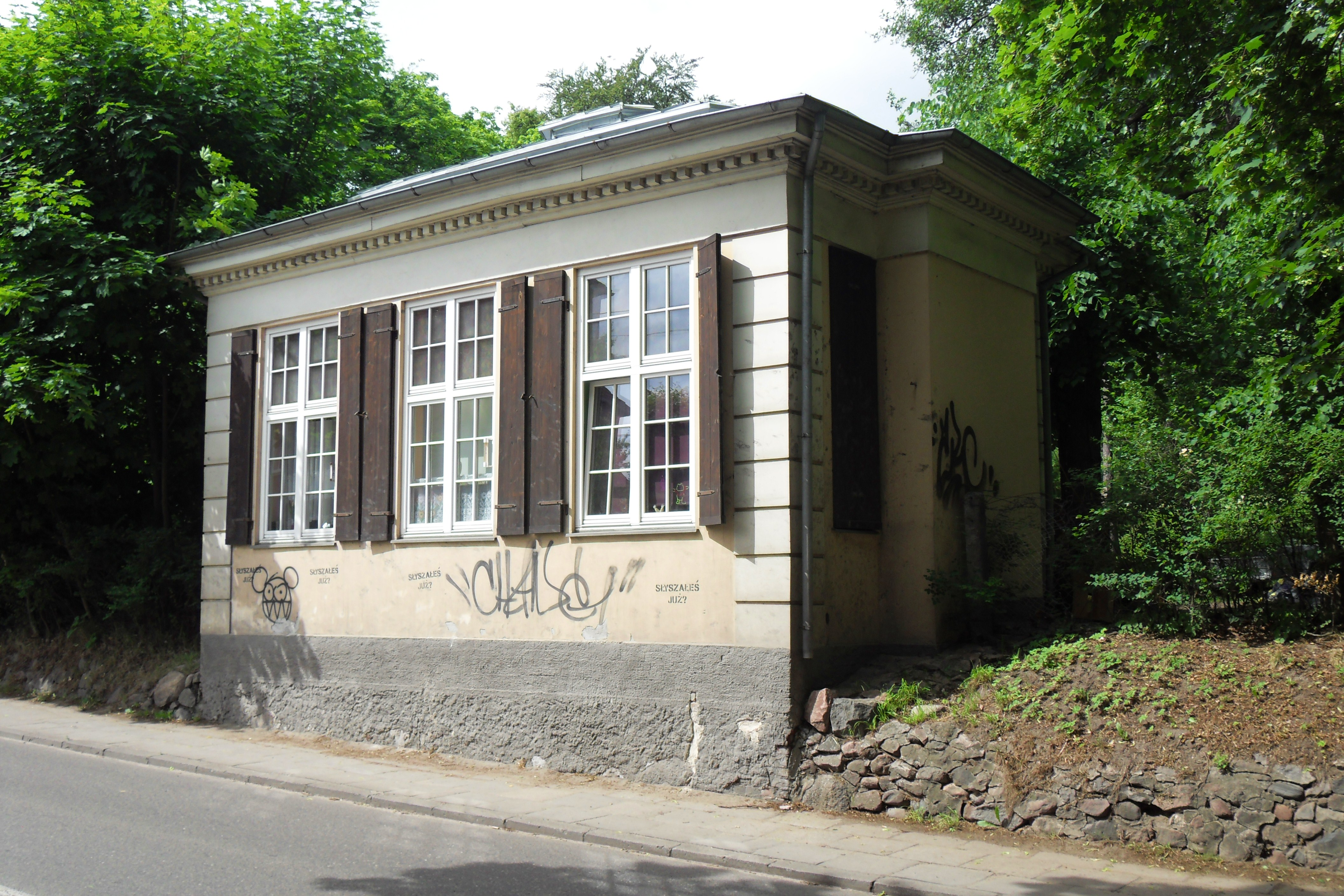 Gdańsk Oliwa, Dwór I, domek/pawilon przy ulicy.